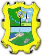 Escudo de Armas de Camargo Tamaulipas